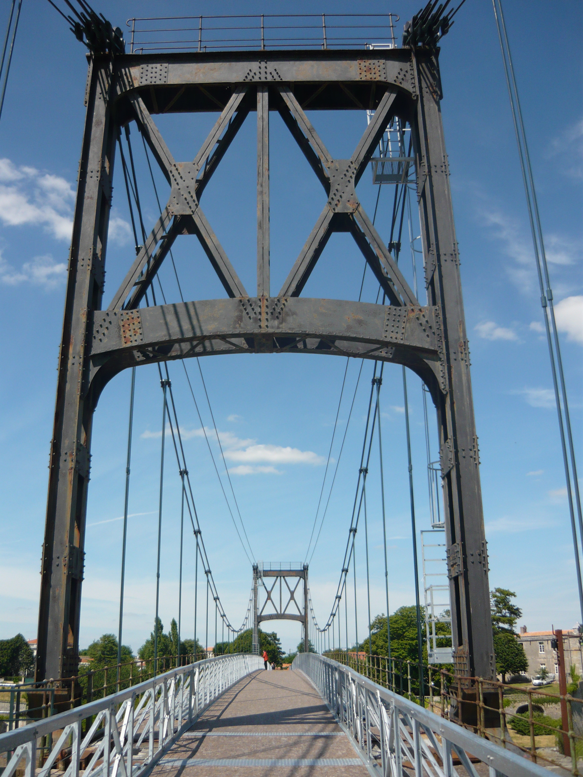 Vue sur les structures métalliques du pont suspendu de Tonnay-Charente (17).